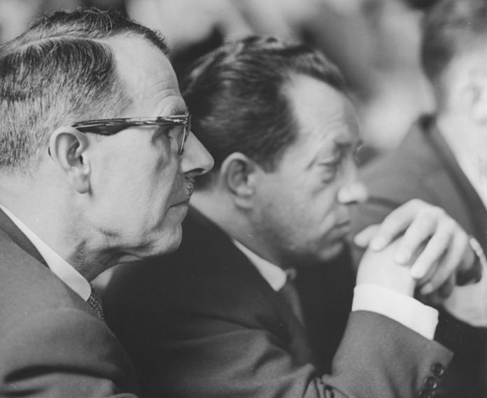 Oberstes Gericht, Globke-Prozess, Pospieszalski Zentralbild Brüggmann Stöhr-8.7.1963 Globke-Prozess eröffnet. Vor dem 1. Strafsenat des Obersten Gerichts der DDR begann am 8. Juli 1963 der von der internationalen Öffentlichkeit mit großer Spannung erwartete Prozess gegen den langjährigen leitenden Mitarbeiter des faschistischen Reichsinnenministeriums und derzeitigen Bonner Staatssekretär Dr. Hans Globke. UBz: Unter den Prozessbeobachtern, Pospieszalski (Polen).